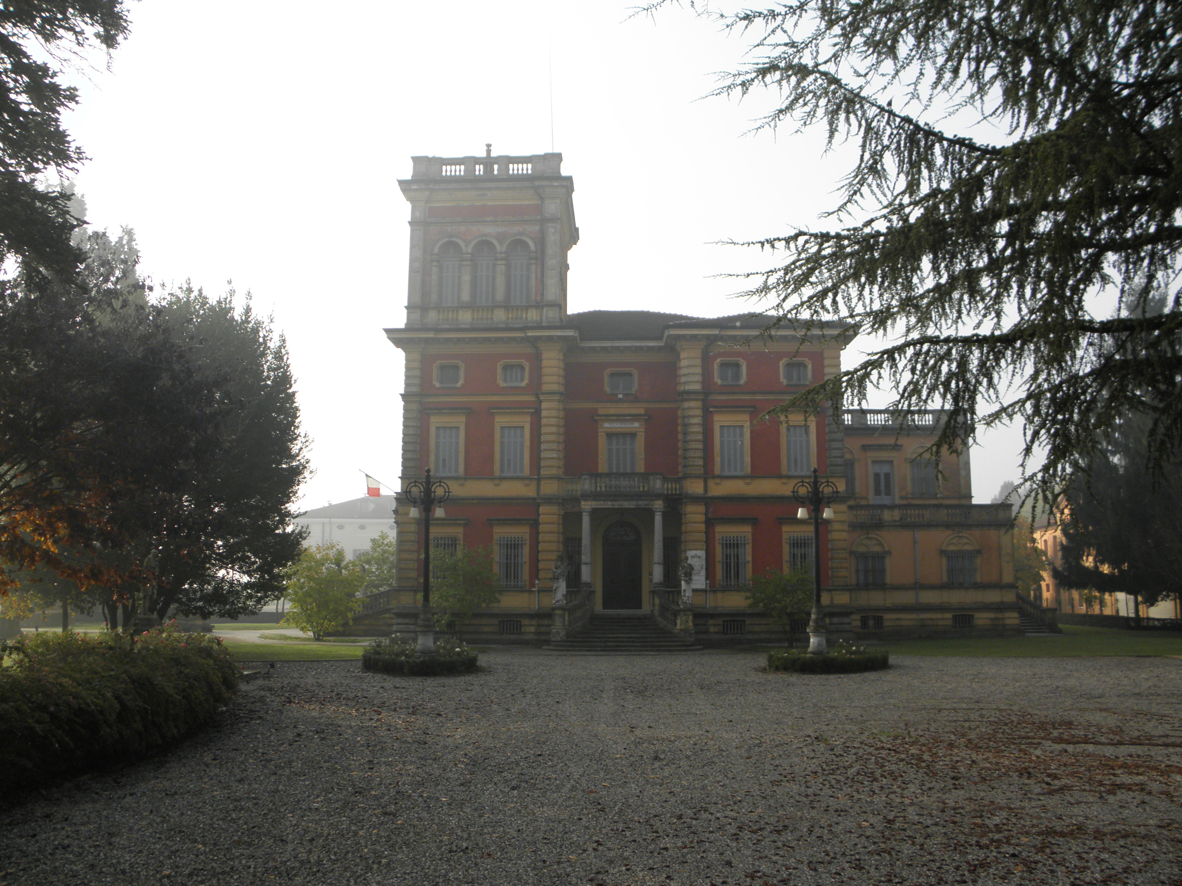 Carbonara di Po, Villa Bisighini, sede del municipio.